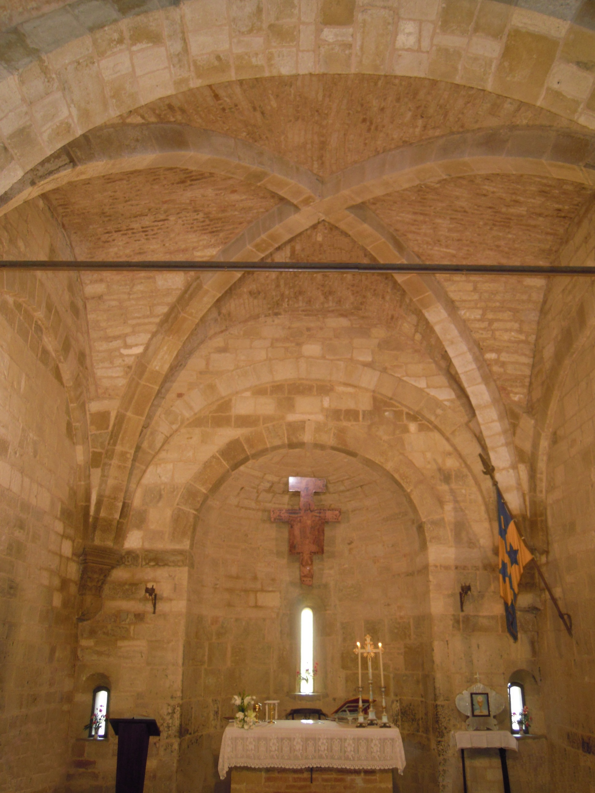 L'interno della chiesa romanica di San Pietro in Villore, presso San Giovanni d'Asso, a navata unica coperta con volta a crociera, piccola abside semicircolare e sottostante cripta a quattro navate.